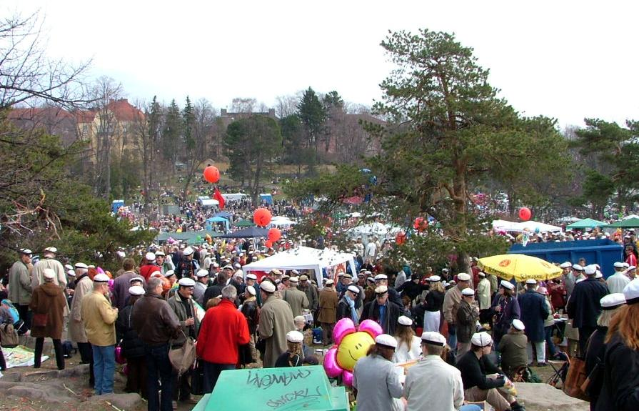 Näkymä Helsingin Kaivopuistoon vapunpäivänä 1.5.2004.